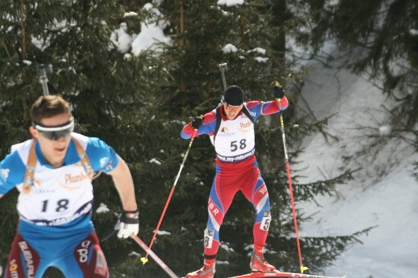 See Title